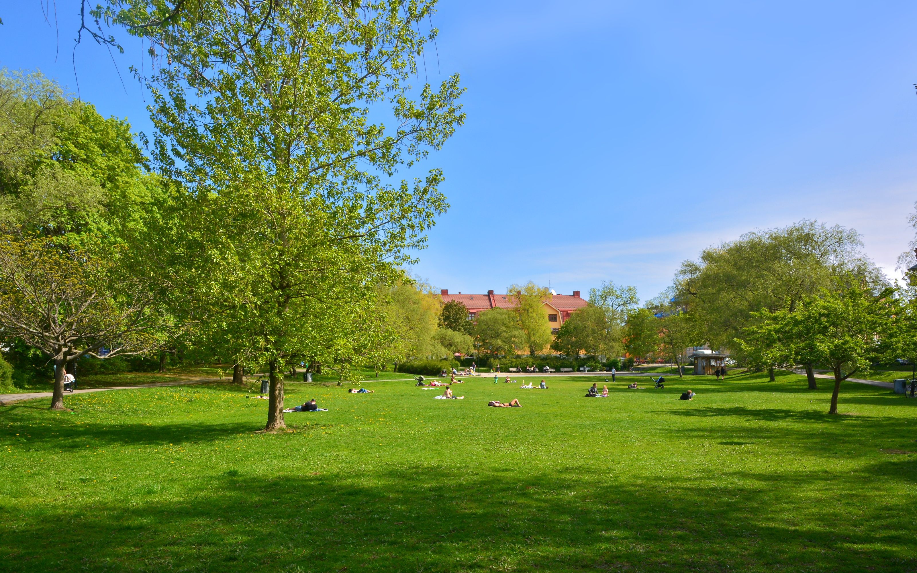 Svanhagen i Midsommarkransen i södra Stockholm.